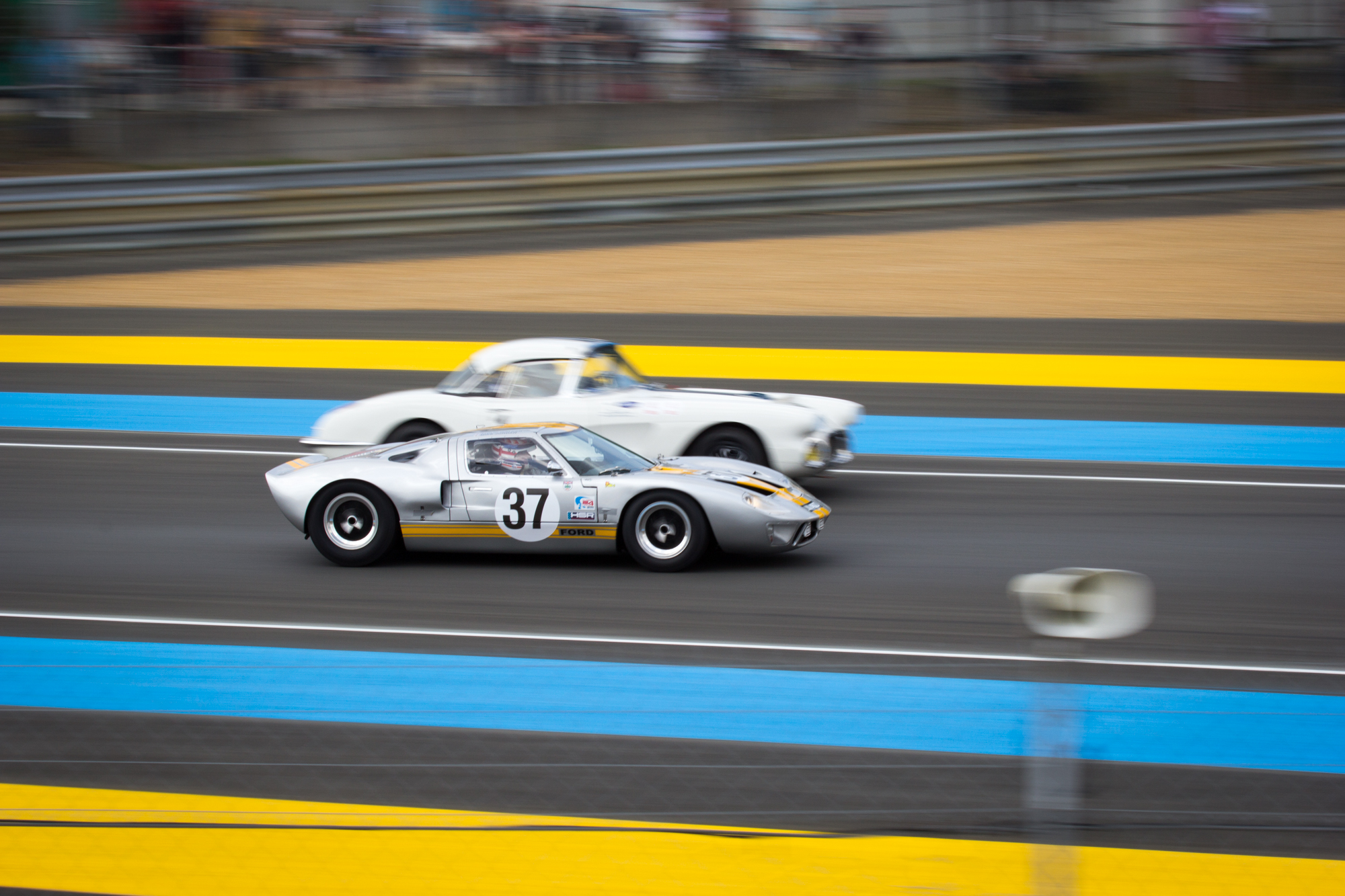 Le Mans Legend 2015 Drivers (Ford): Philip Walker, Miles Griffiiths Driver (Chevrolet): Alan Rüede